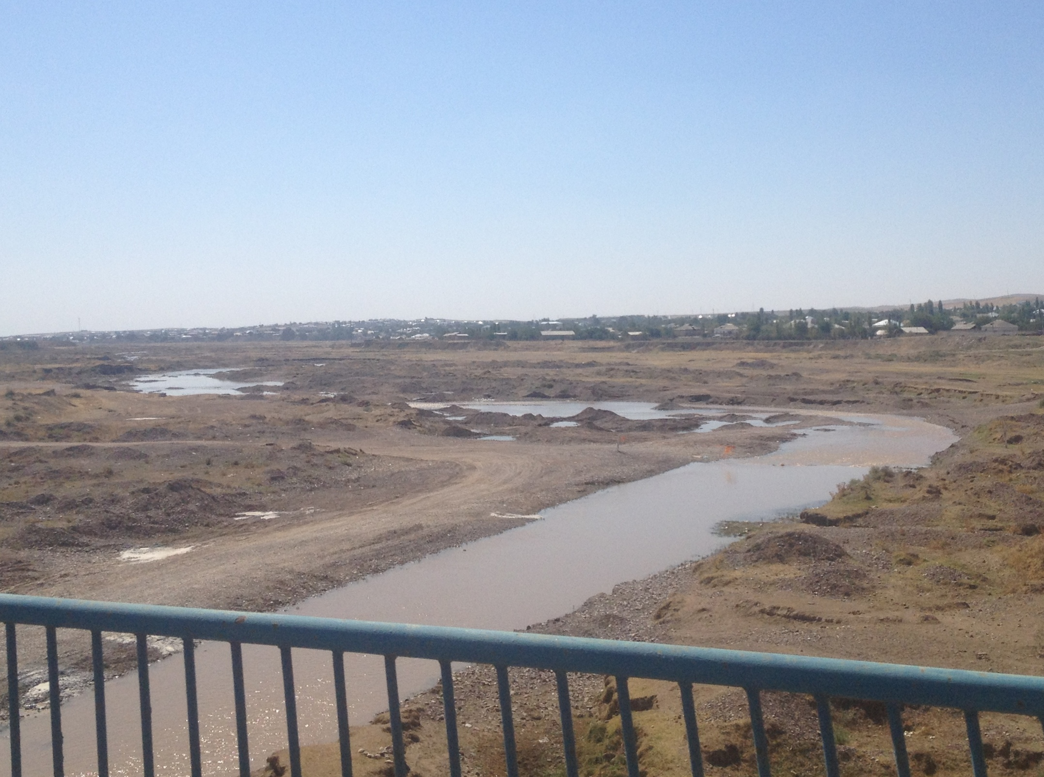 Река Келес выше Казыгурта